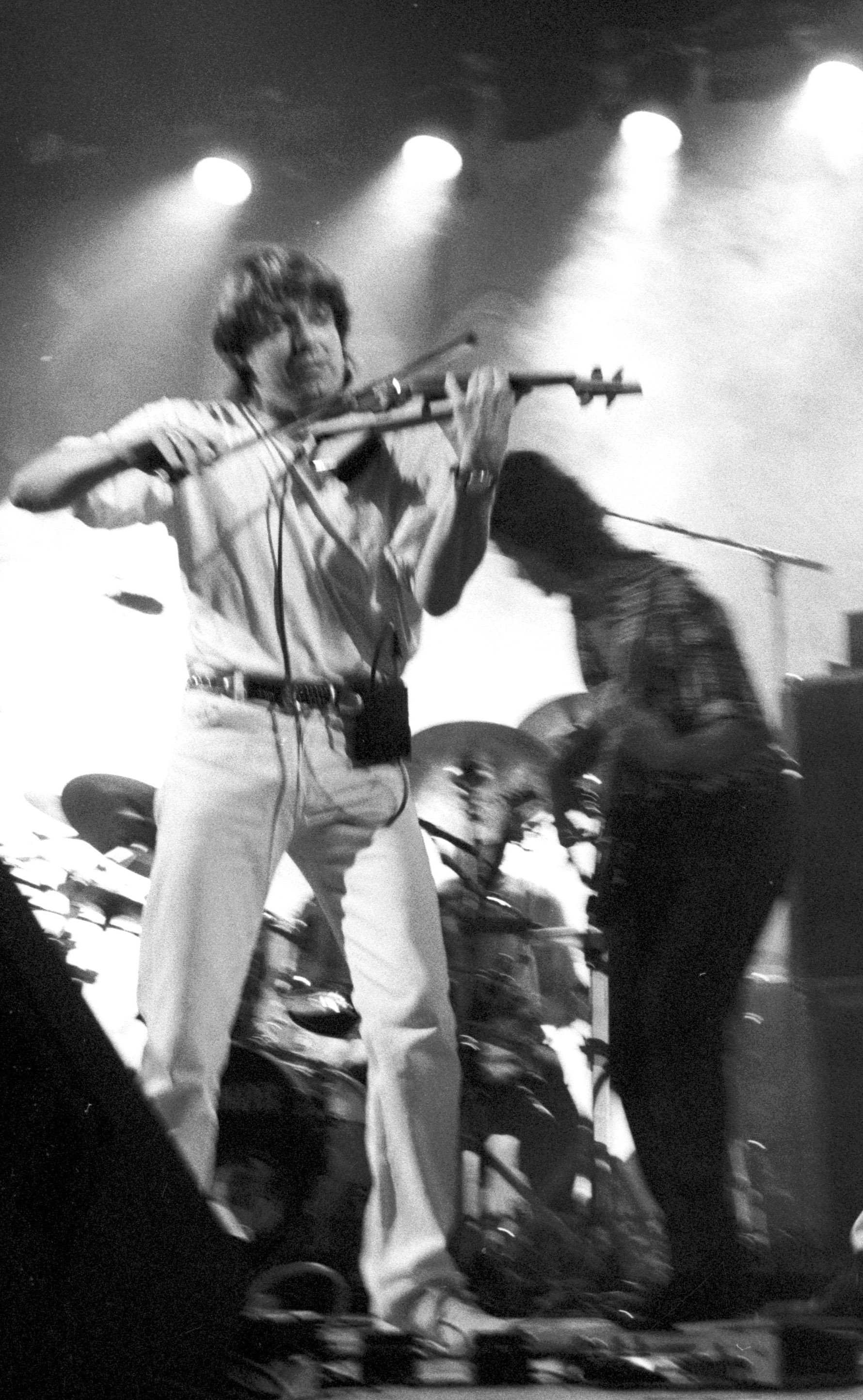 Le violoniste de jazz (France) Didier Lockwood en concert à Deauville (Normandie, France) en 1992.